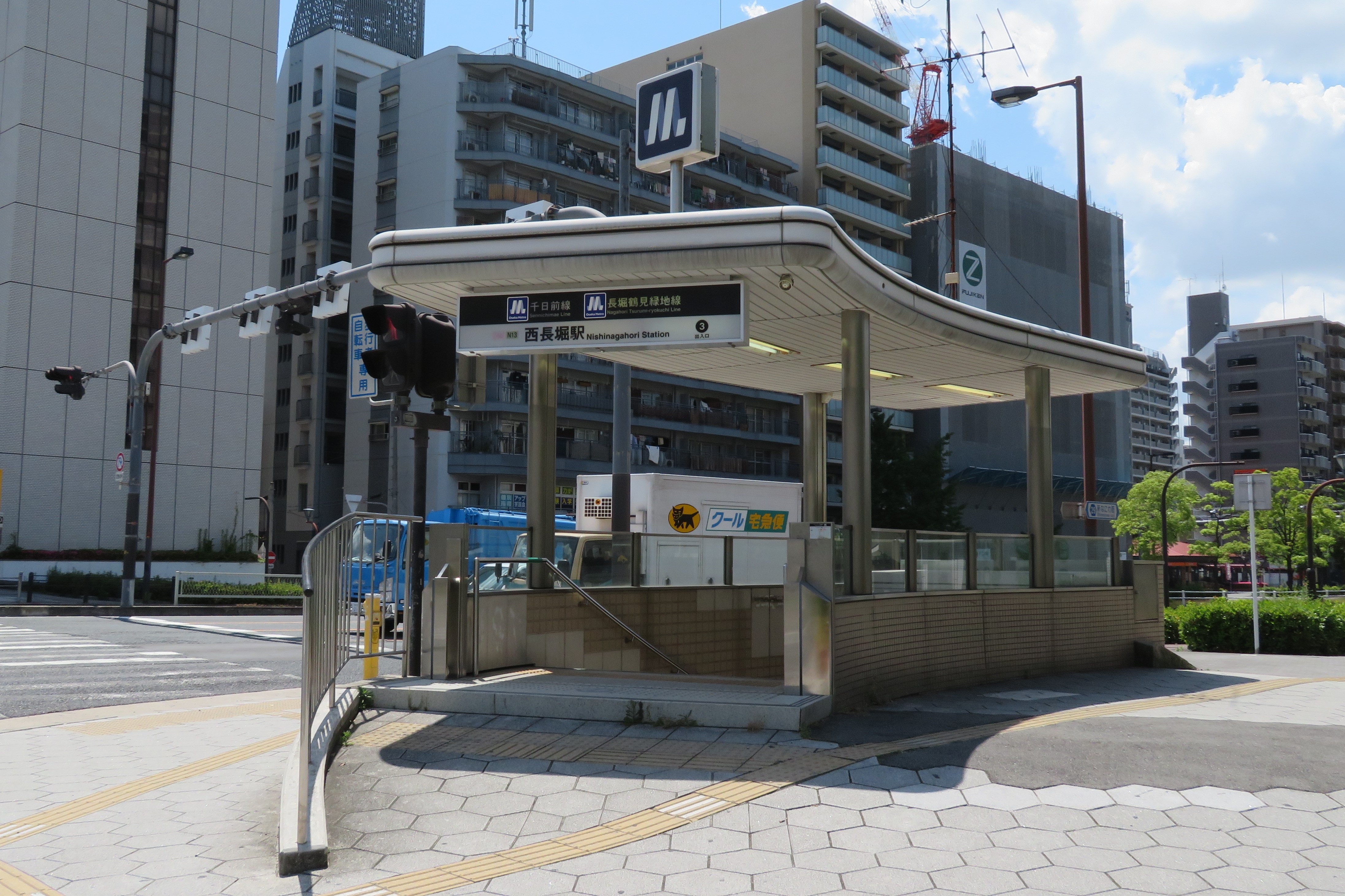 大阪市高速電気軌道 (Osaka Metro)西長堀駅